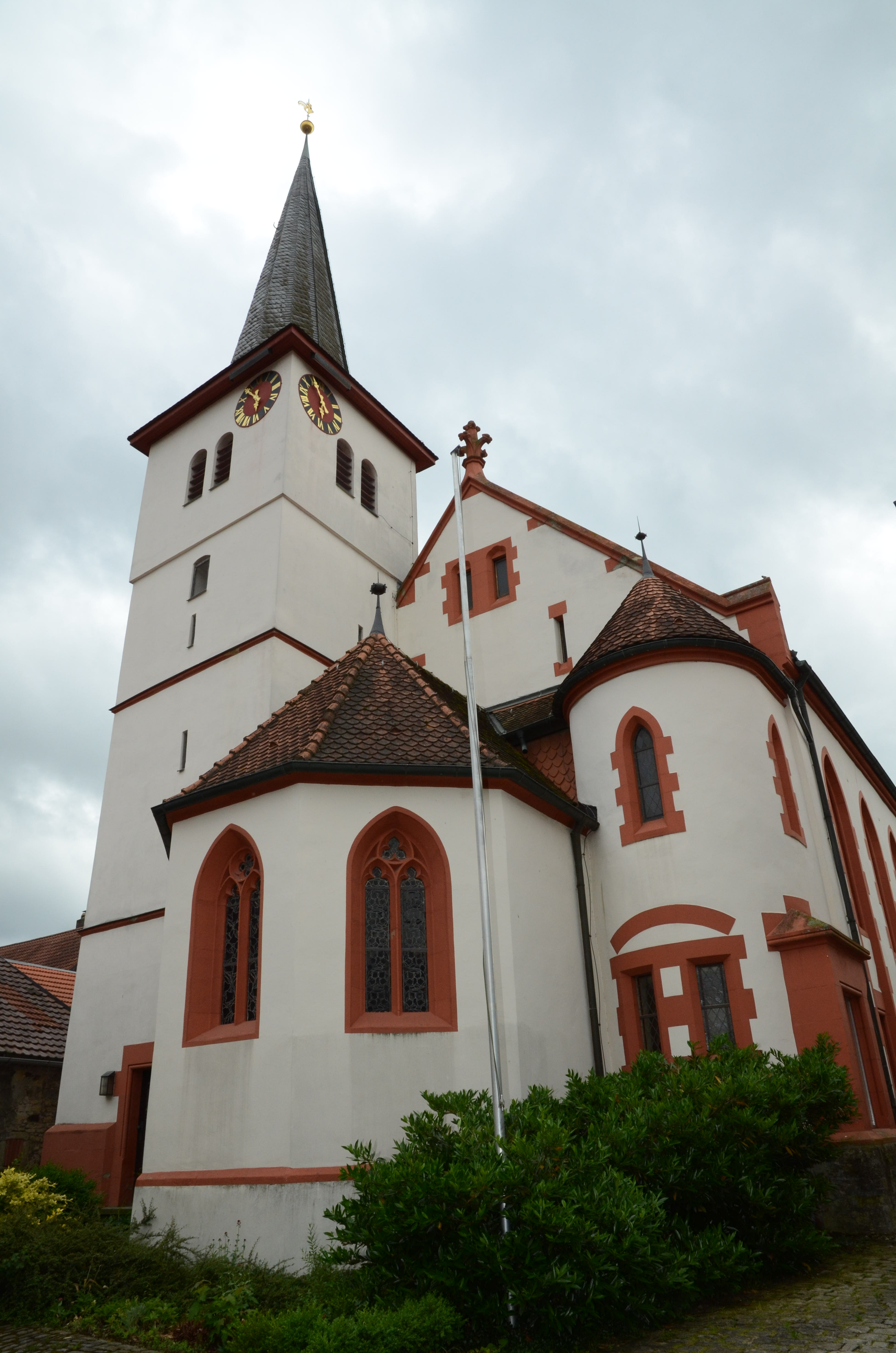 evang.-luth. Kirche in Eichfeld